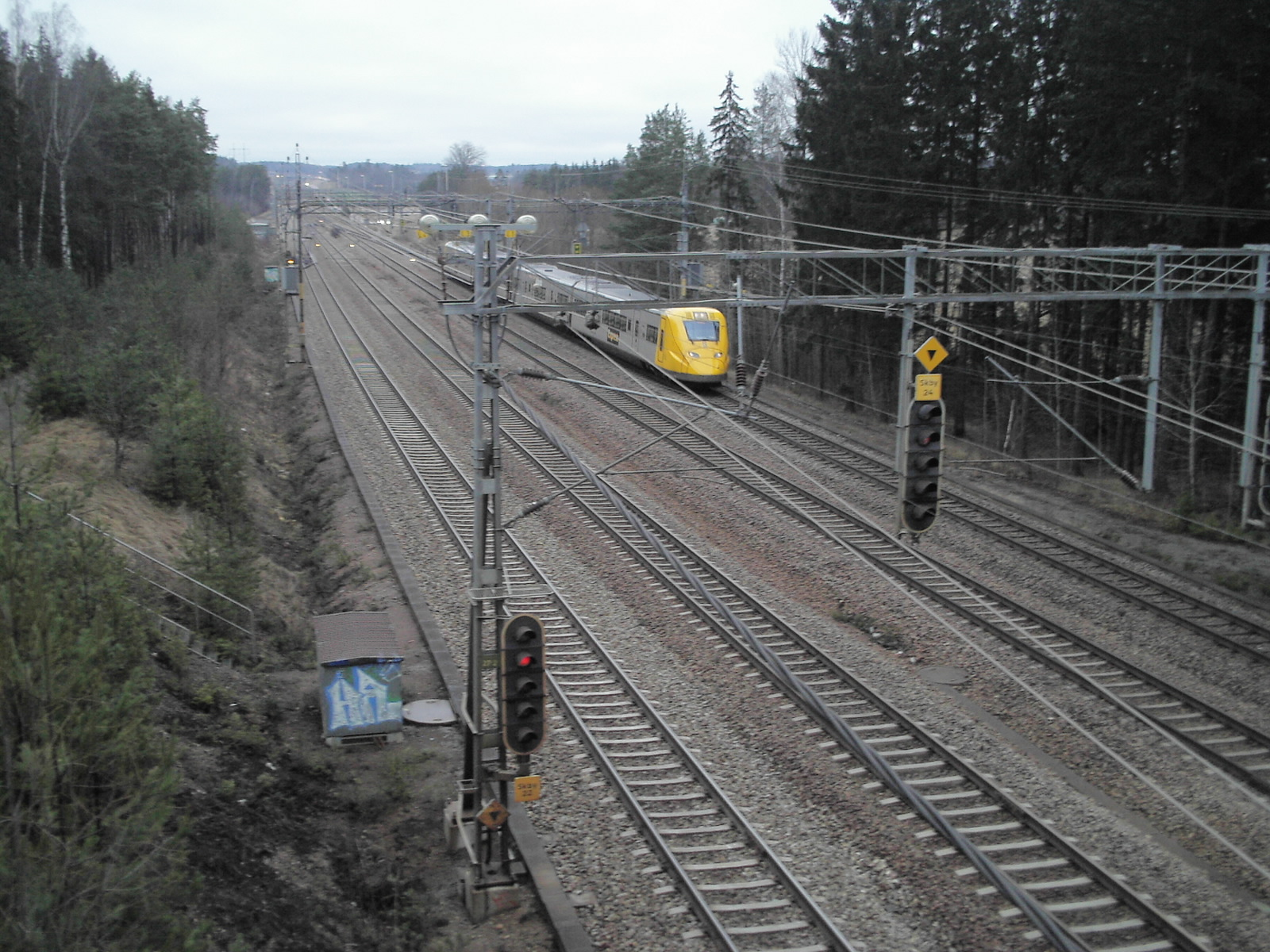 Arlandatåg på Skavstaby driftplats norr om Upplands Väsby